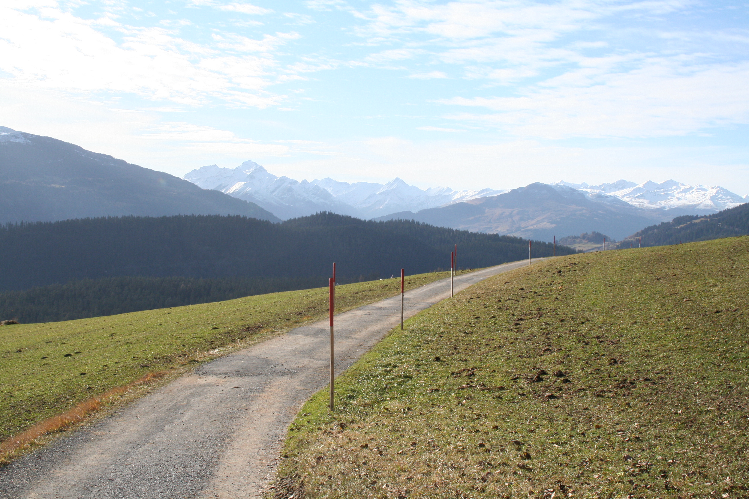 Senda Surselvana (Höhenweg) bei Fidaz